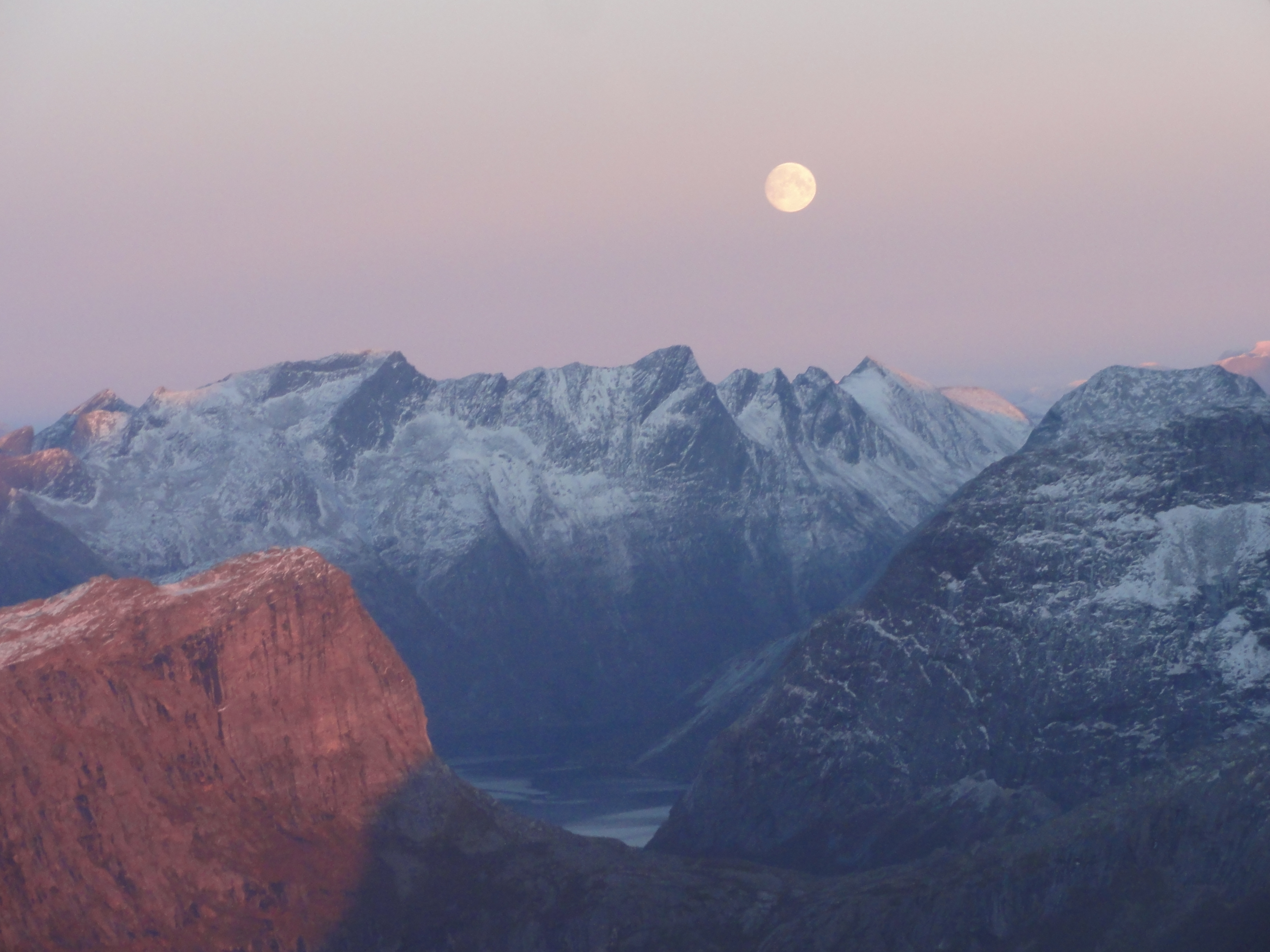 Bildet tatt mot øst fra fly over Brattfjorden i Steigen kommune i Nordland med utsyn over skaret mellom Brattfjorden og Vinkfjorden. Utsikt mot Ingridtinden nærmes til venstre. Videre ser en over mot Tverrfjellet og Nordtinden helt til høyre. En kan se ned i Vinkfjorden og videre innover Stavfjorden og fjellkjeden på halvøya Stábánjárgga. I det fjerne litt til venstre under månen sees Ingerbakktinden og noe til høyre for månen sees Geittinden. Tinden til venstre i den samme fjerne fjellkjeden er Reinviktinden. Disse tindene danner grennsen mellom Sørfold og Steigen.